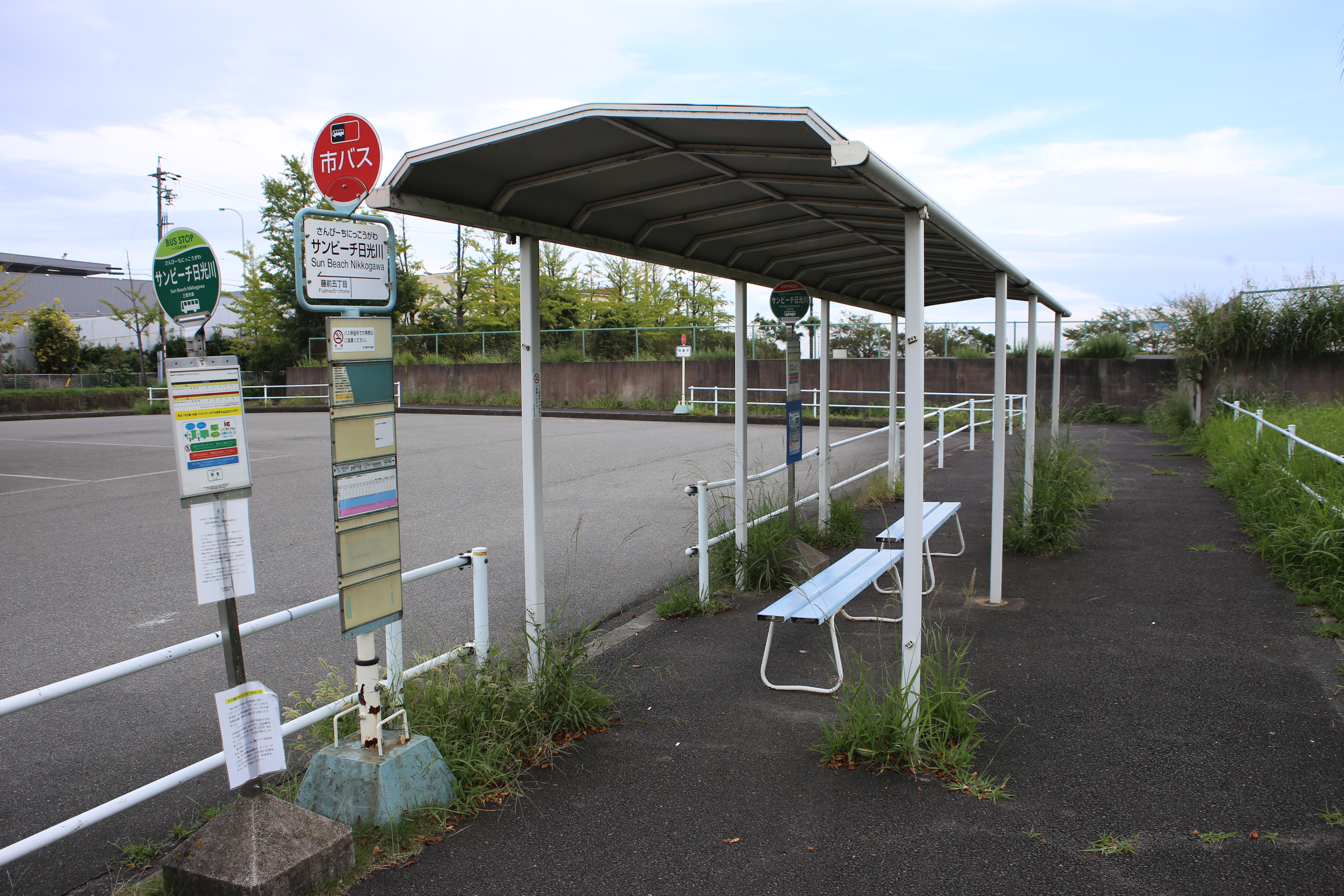 名古屋市港区藤前五丁目の日光川公園の「サンビーチ日光川」バス停